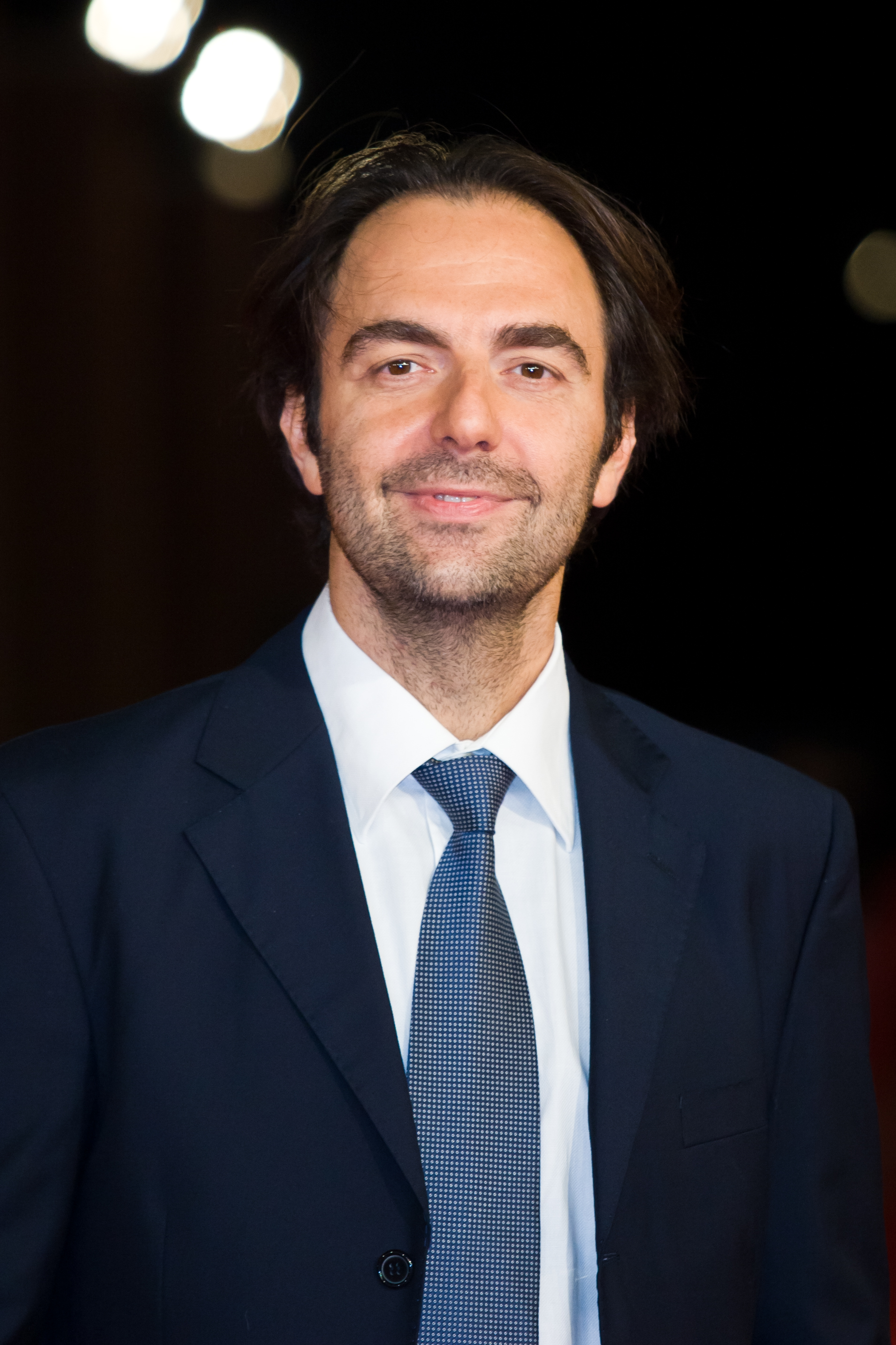 Neri Marcorè alla Festa del cinema di Roma